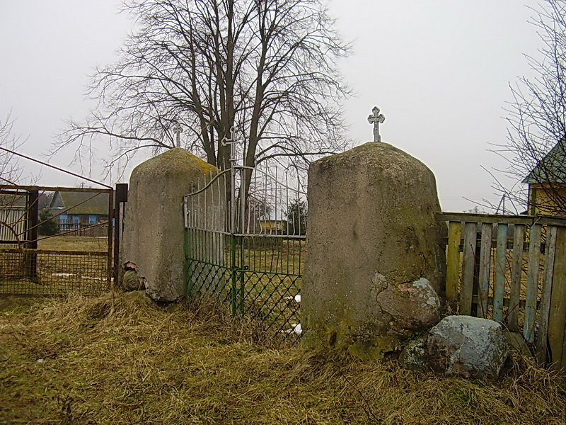 Вялікія Жухавічы. Свята-Петра-Паўлаўская царква. Брама